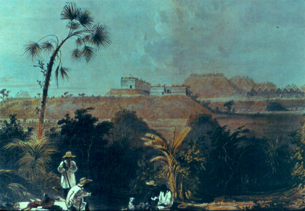 Uxmal: Zeichnung von Frederick Catherwood